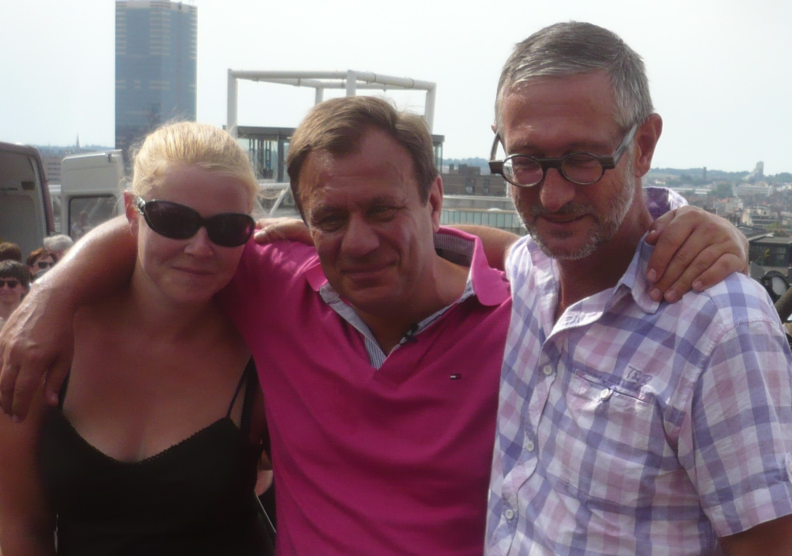 Manifestatie tegen vrijlating michelle martin - Laetitia Delhez, Jean-Denis Lejeune en Paul Marchal omarmen mekaar